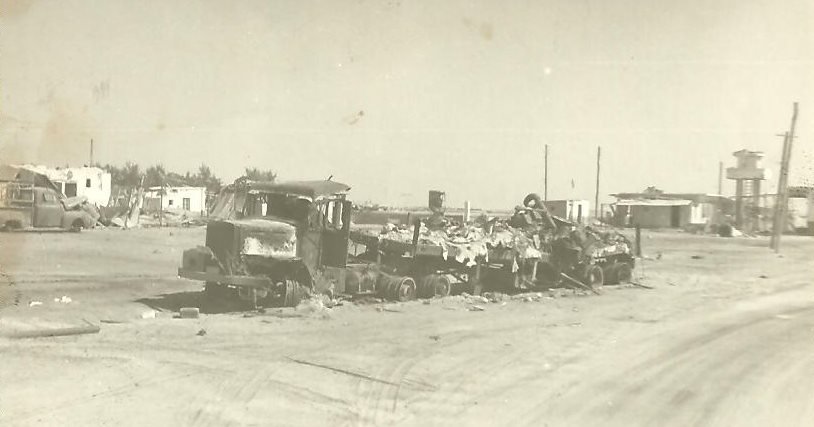 ספינת ברטרם של שייטת 13ספגה פגיעה ישירה ועלתה באש, בעודה על הרכב, בפורט תאופיק.